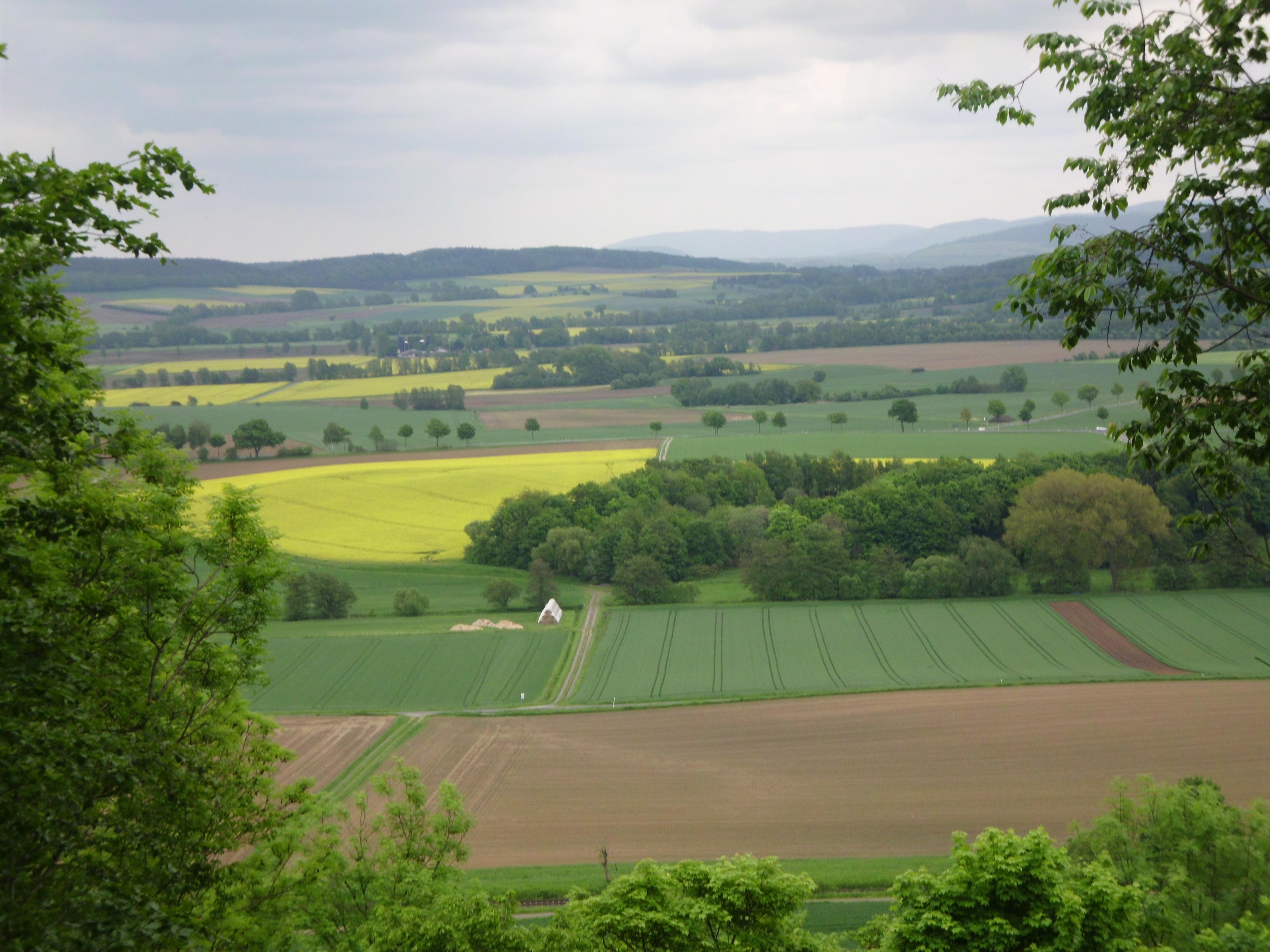 Landschaft bei Nauen, Gemeinde Lutter am Barenberge